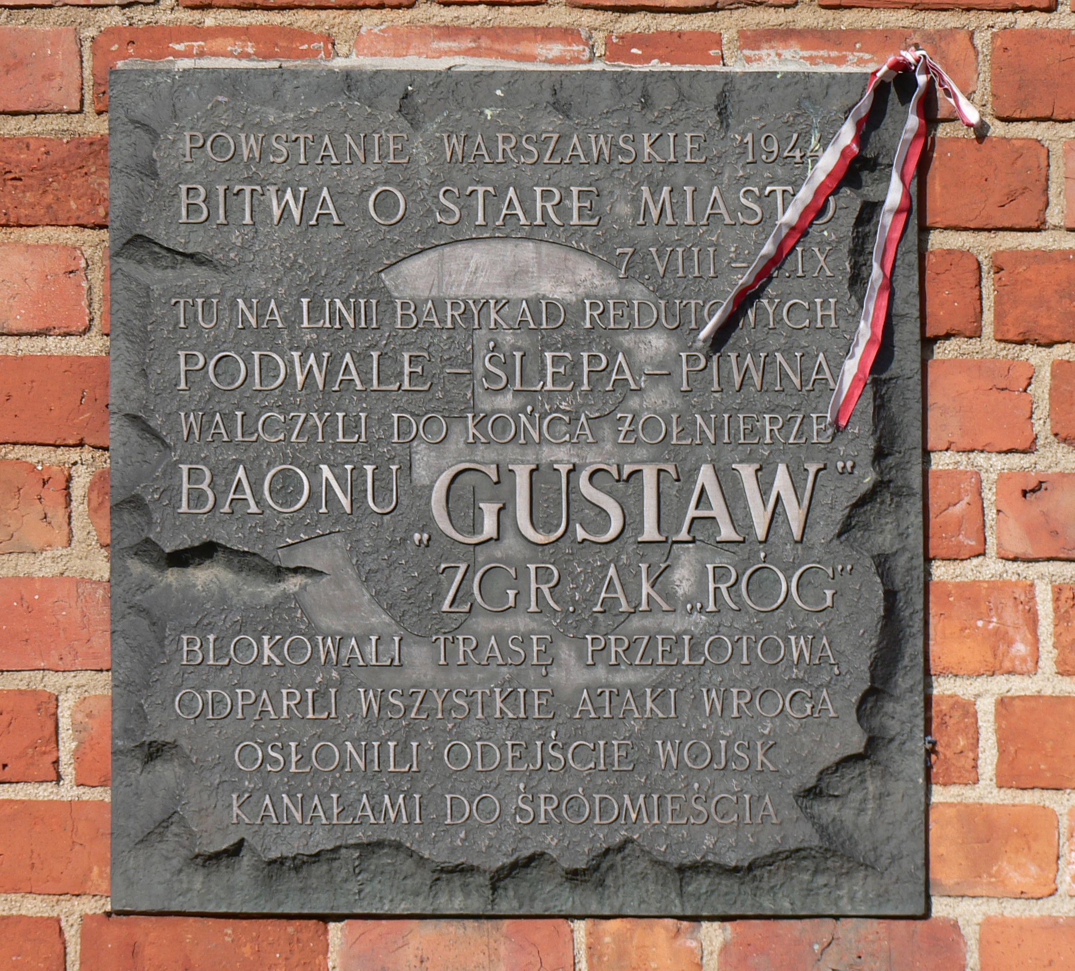 Tablica upamiętniająca Batalion "Gustaw" na murach miejskich w Warszawie